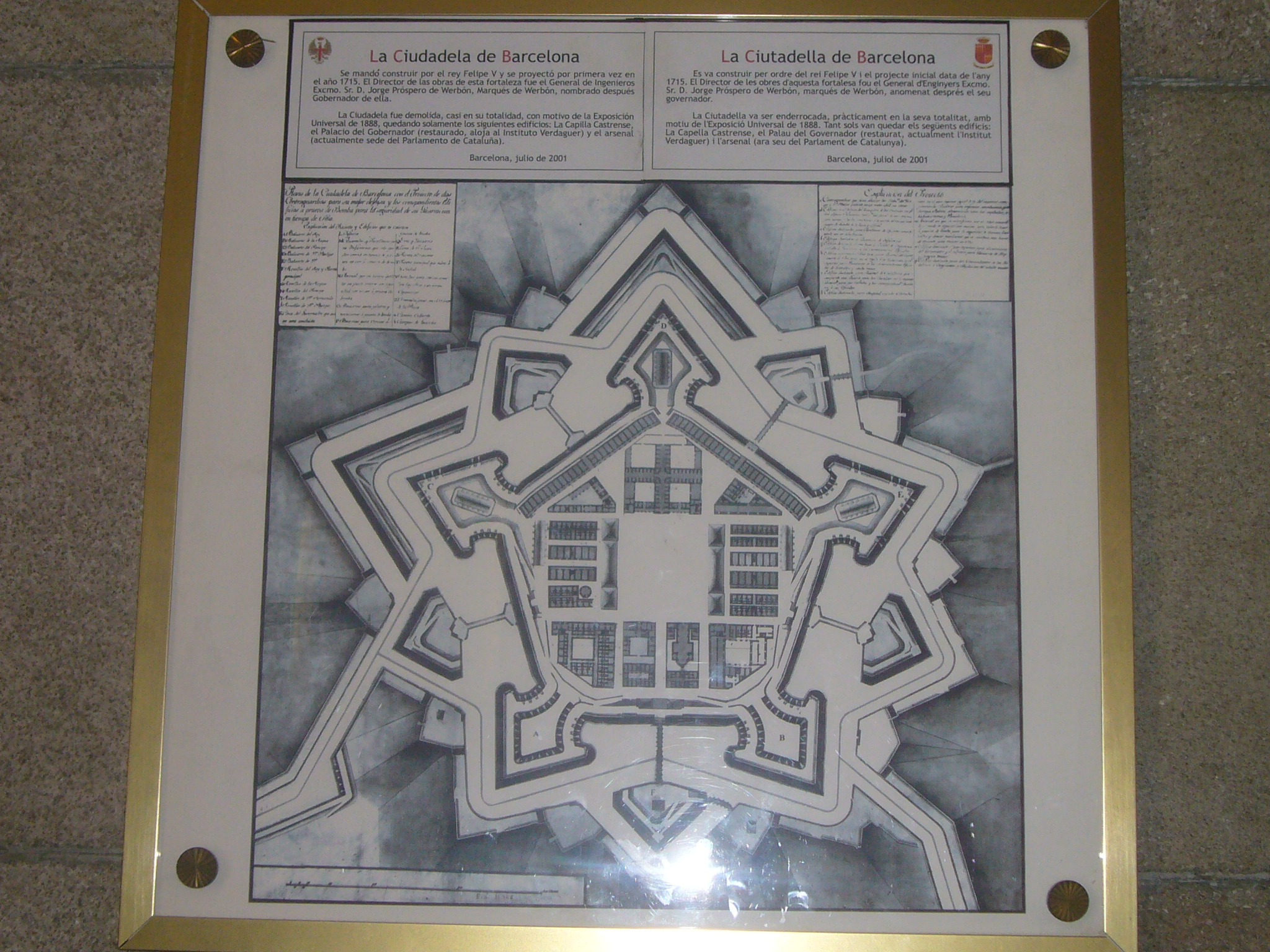 Plànol de la fortificació de la Ciutadella de Barcelona, ubicat a l'interior de l'Església de la Ciutadella